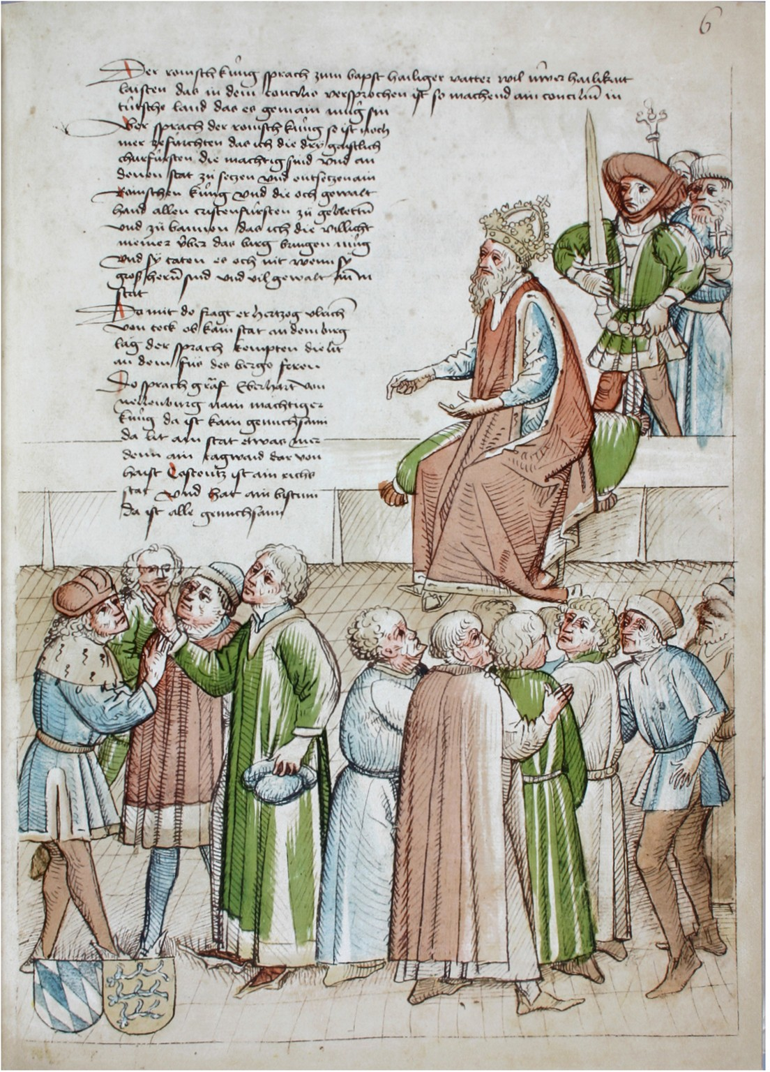 Rosgartenmuseum Konstanz, Hs. 1, Richental: Konzilschronik. In: Feger, Otto (Bearb.): Ulrich Richental: Das Konzil zu Konstanz. Faksimile. Starnberg - Konstanz 1964. Fol. 6r